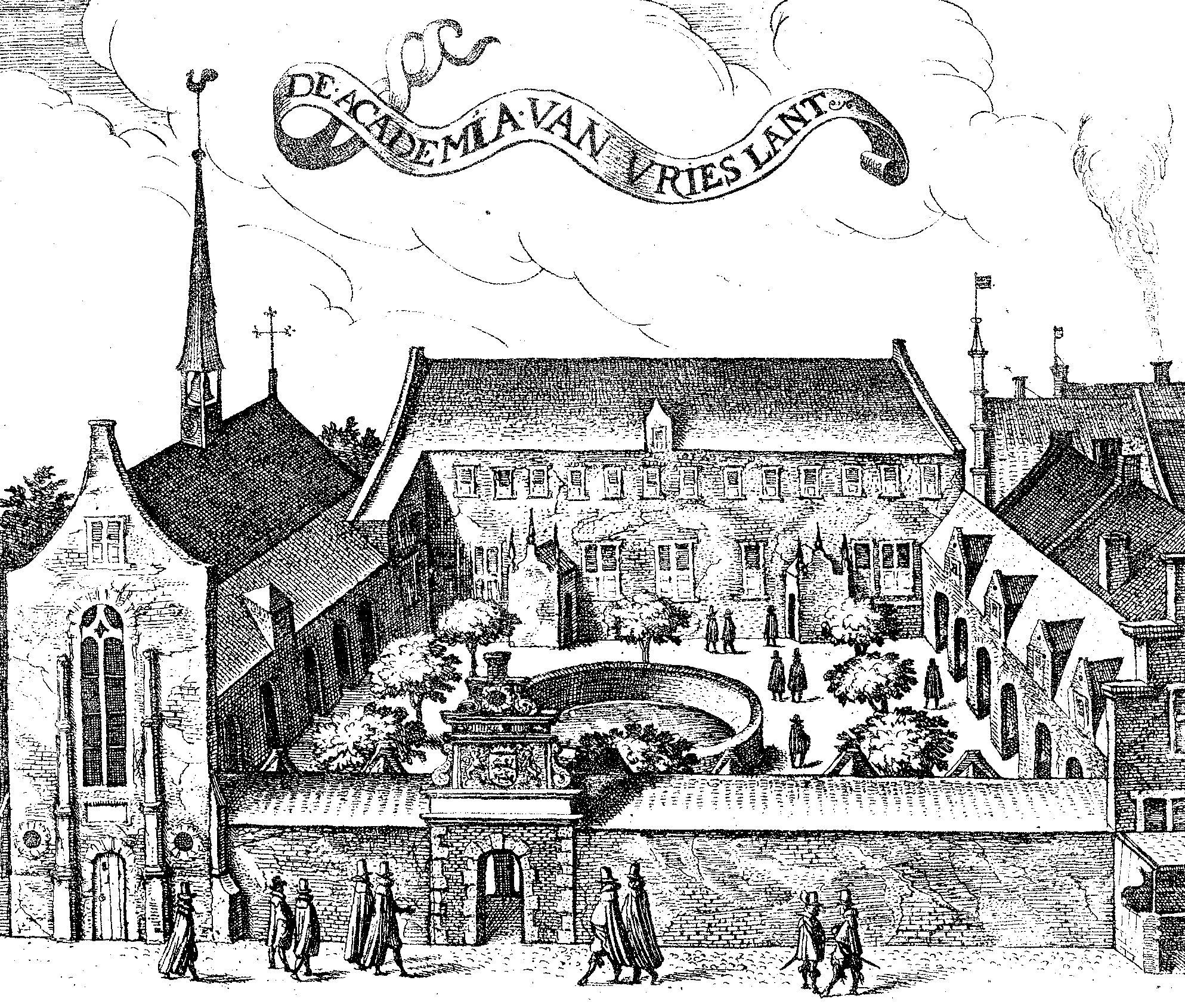 Frjentsjer, de akademy fan Fryslân